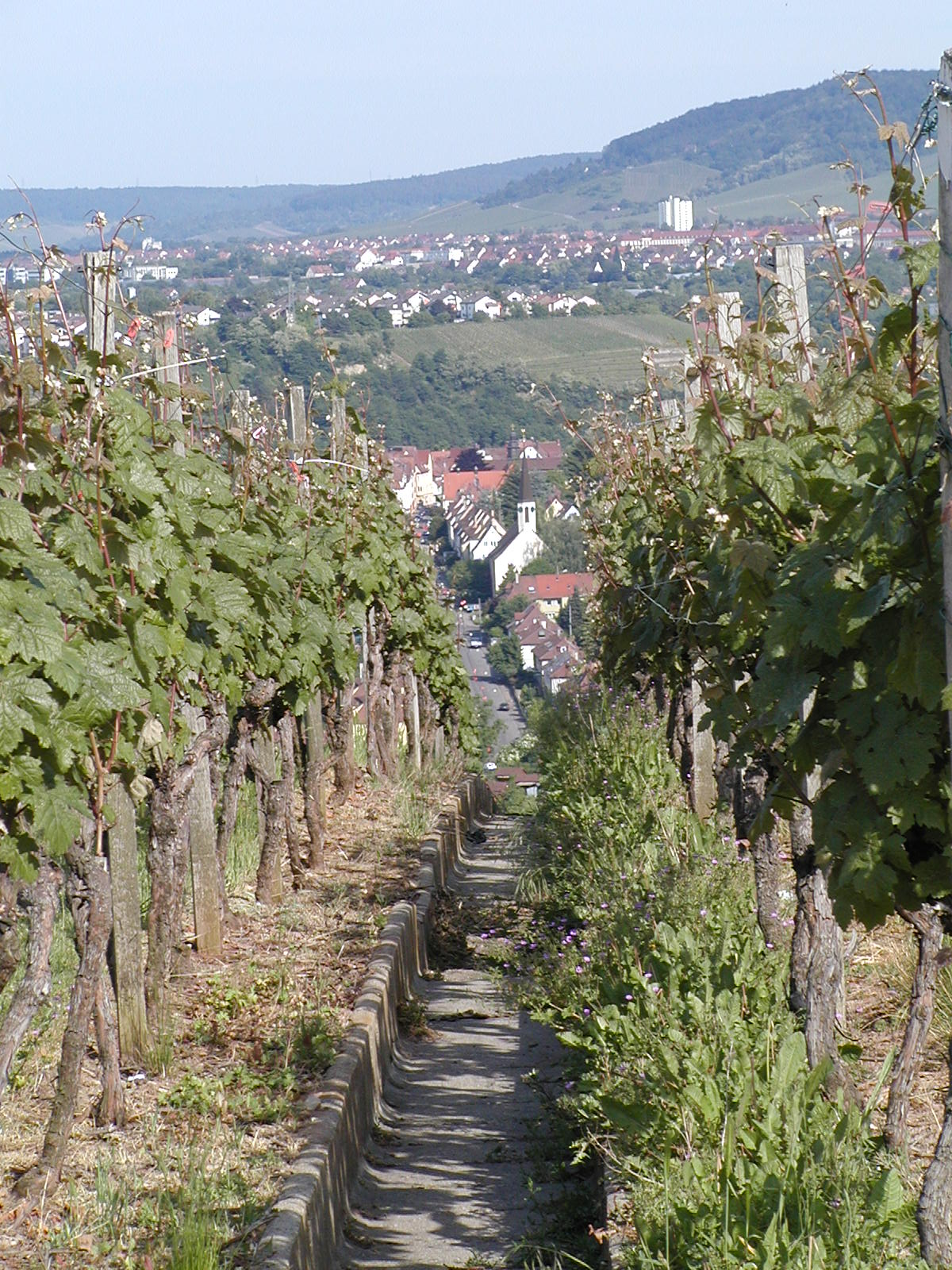 Durch den Wein ein Blick auf Stuttgart Münster